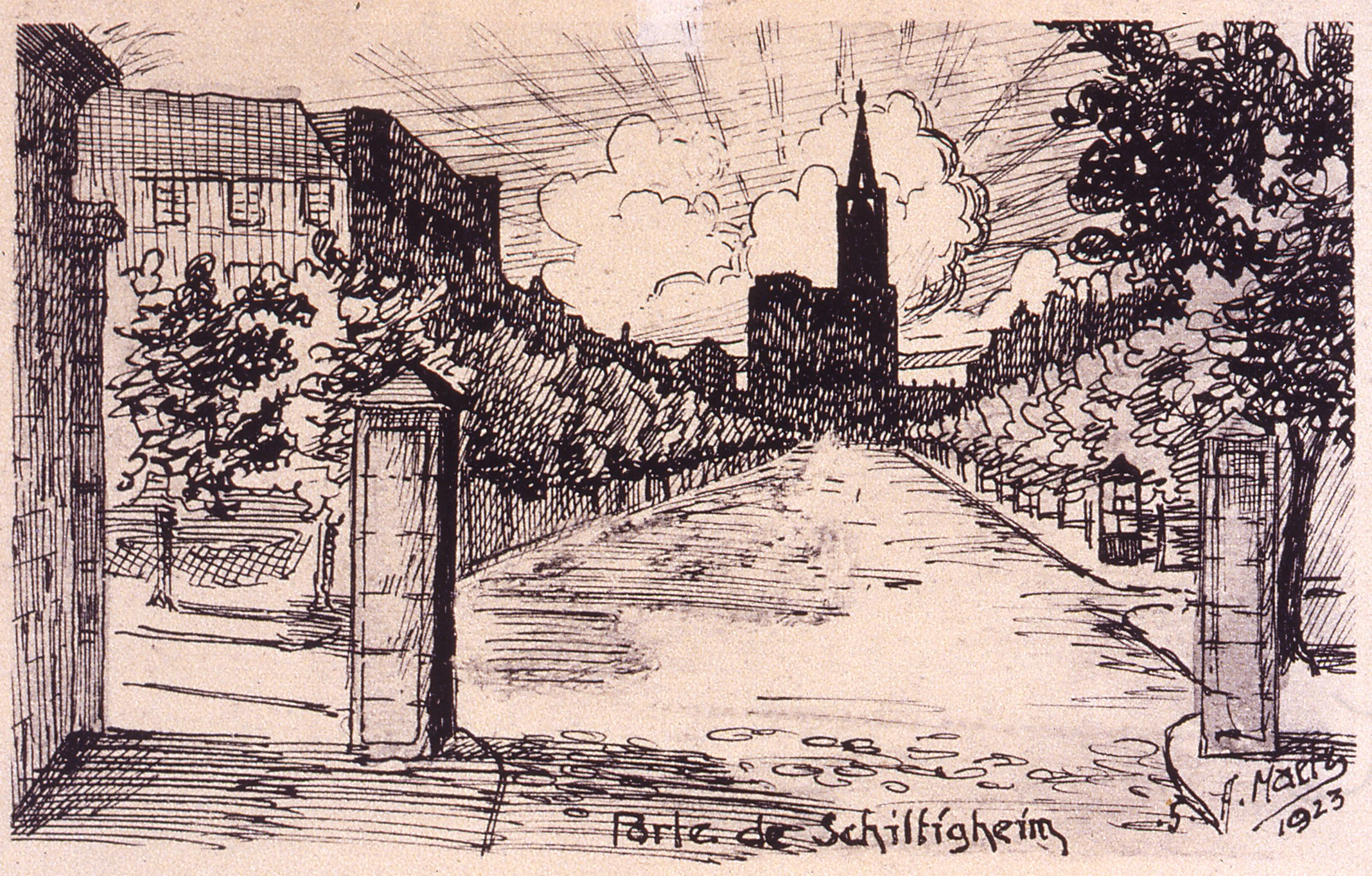 Dessin de la porte de Schiltigheim à Strasbourg par A. Maetz